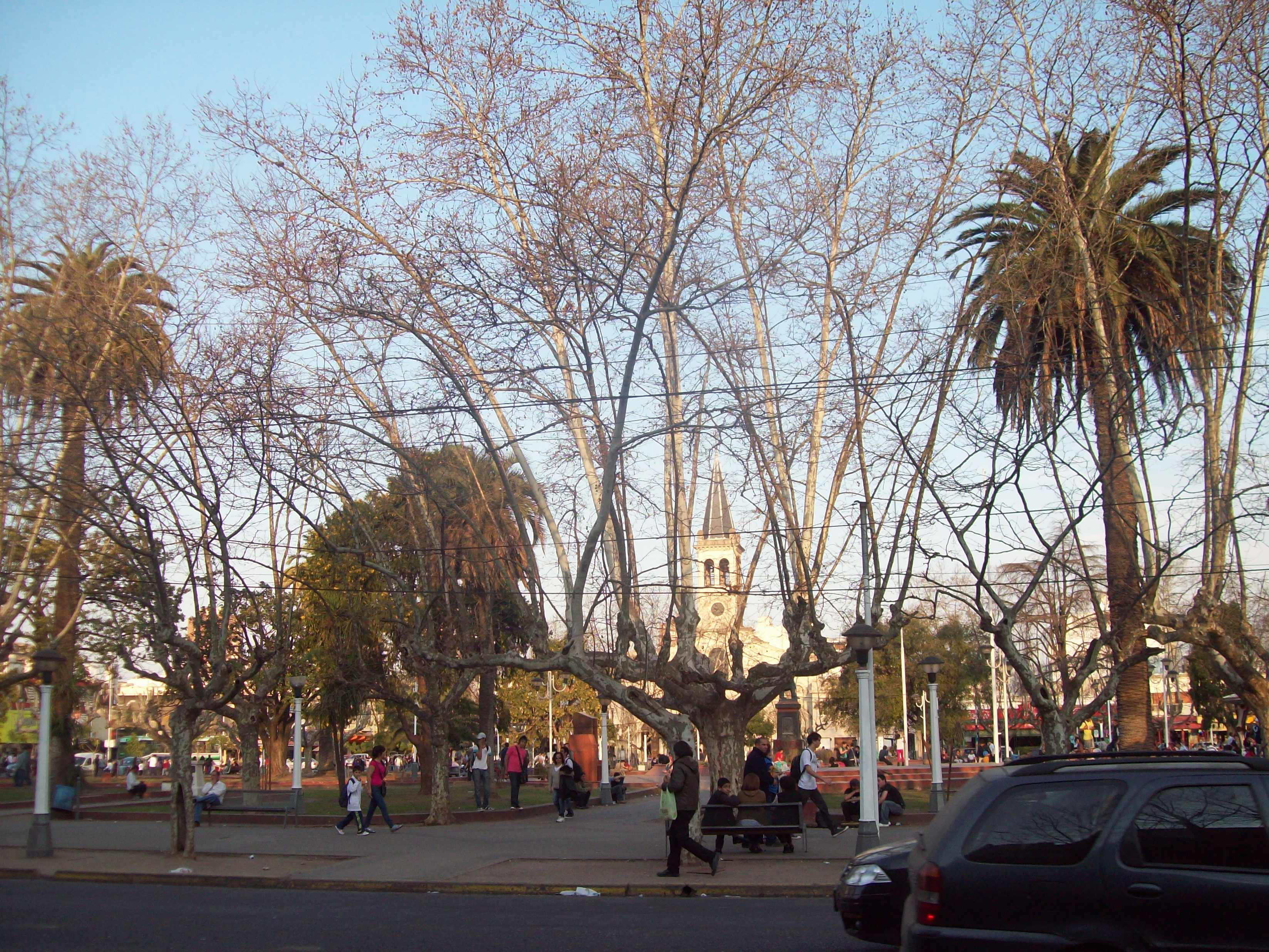 Plaza San Miguel, de la Localidad de San Miguel